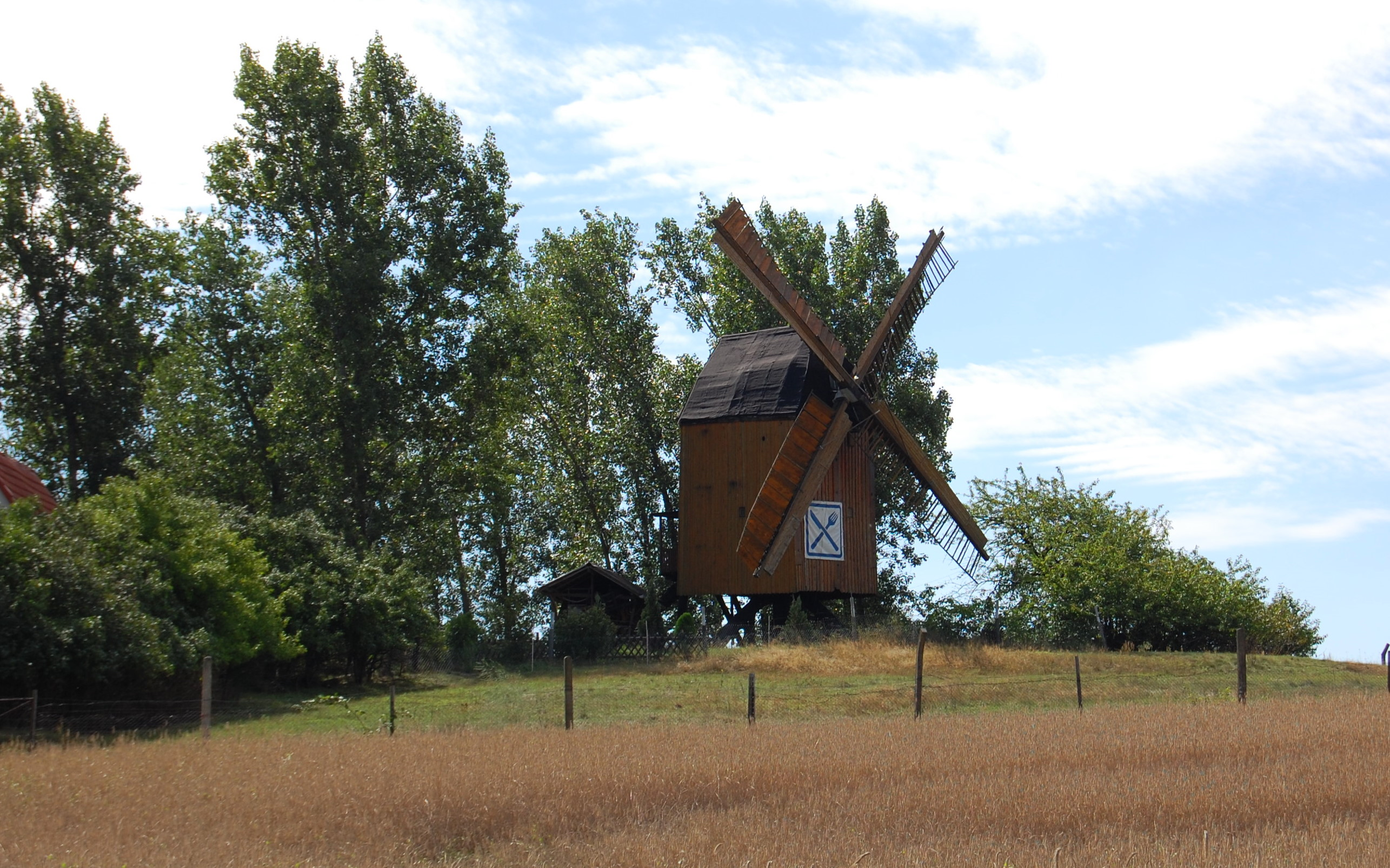 Windmühle bei Lostau an der A 2